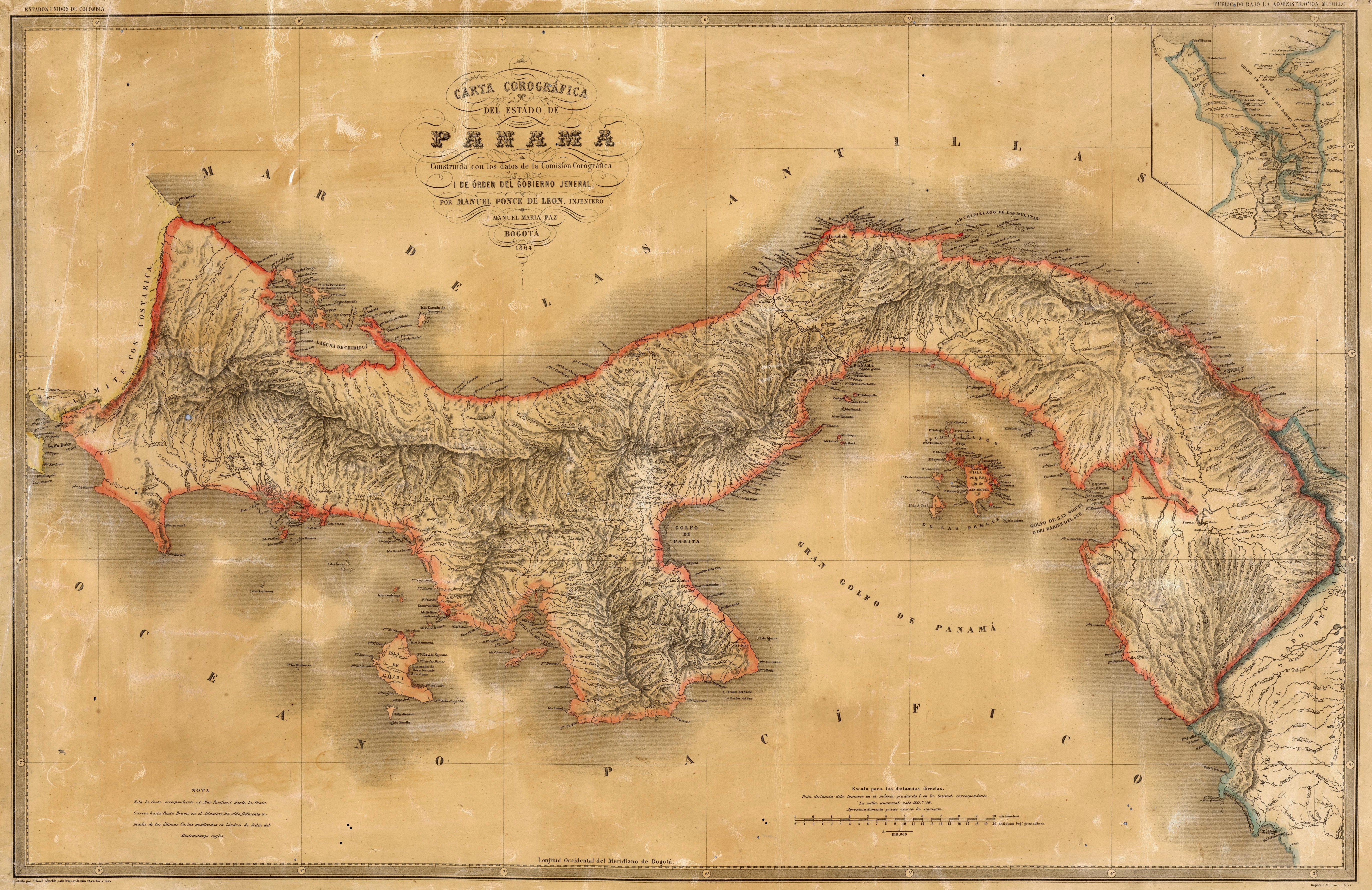 Carta Corográfica del Estado Soberano de Panamá. Tomado del "Atlas de los Estados Unidos de Colombia, antigua Nueva Granada", 1865.